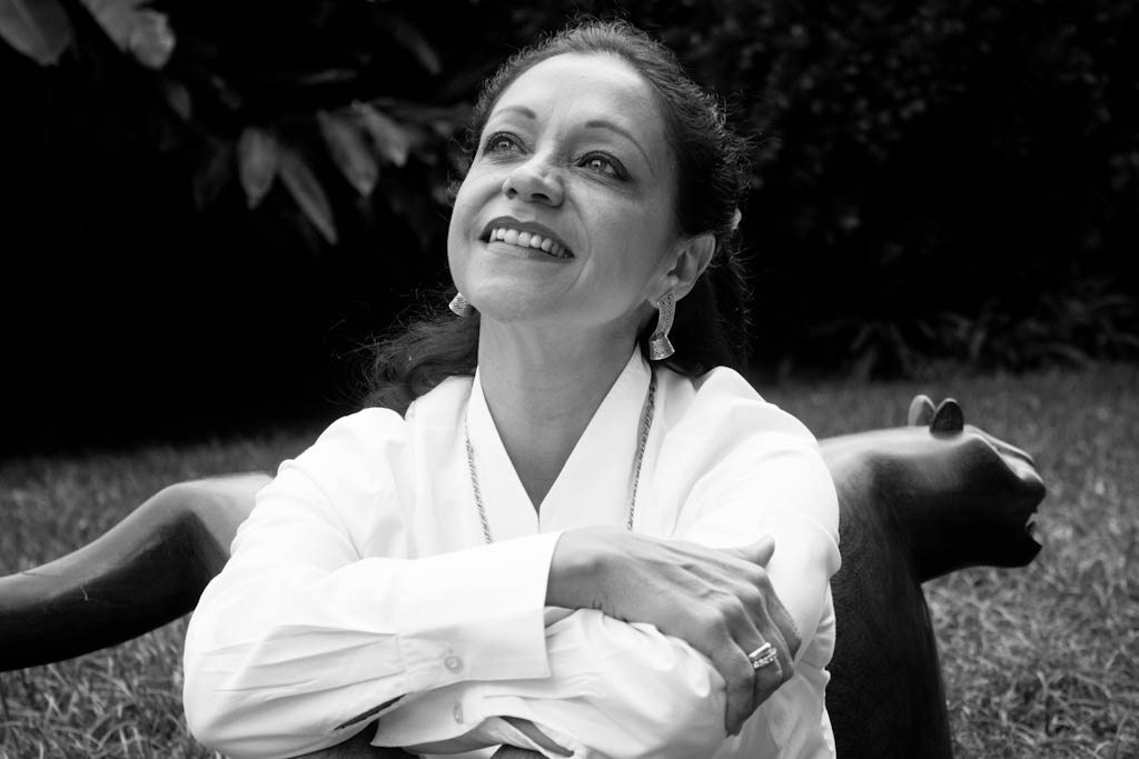 Margarita Cadenas by Luisa Himiob